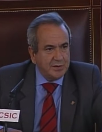 Intervención de Emilio Lora-Tamayo en la reunión de directores del CSIC (Junio 2014).